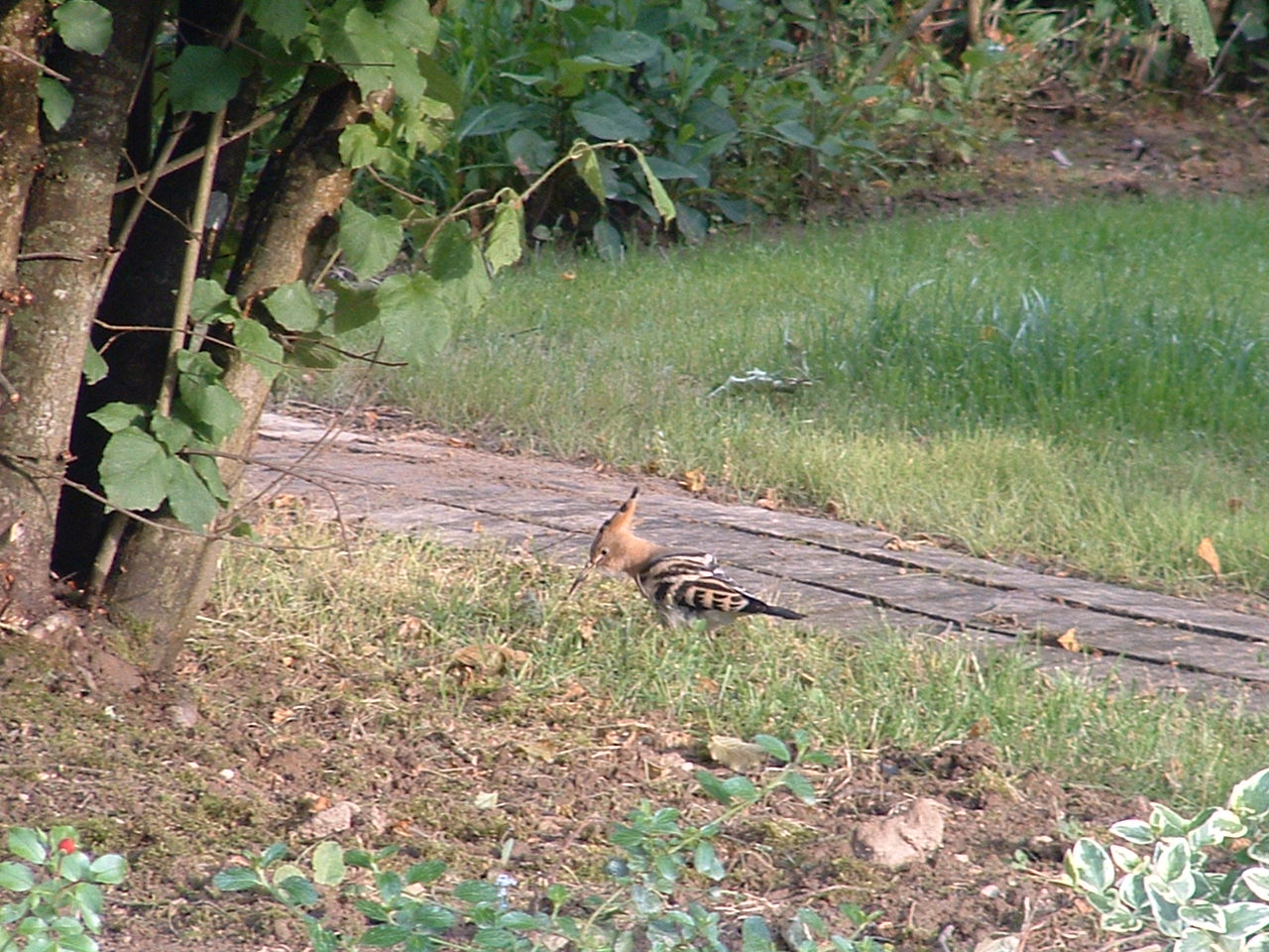 Upupa epops, Tyrosse, France.